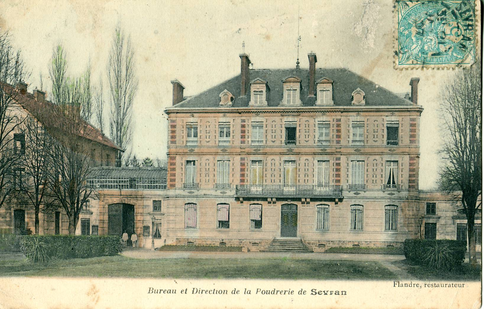 Carte postale ancienne éditée par Flandre, restaurateur Bureau et Direction de la Poudrerie de Sevran